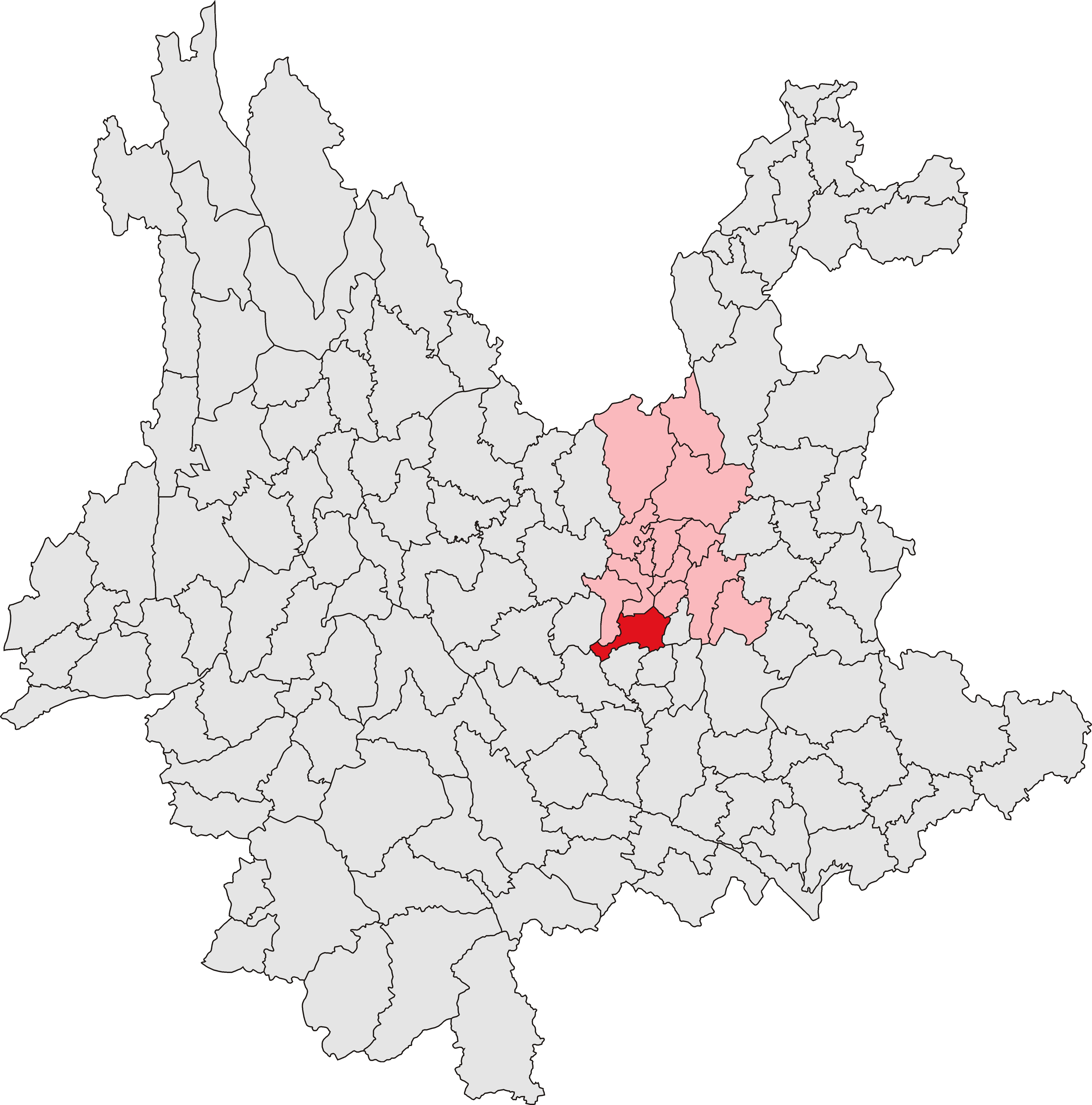 中文（中国大陆）: 晋宁区位置图